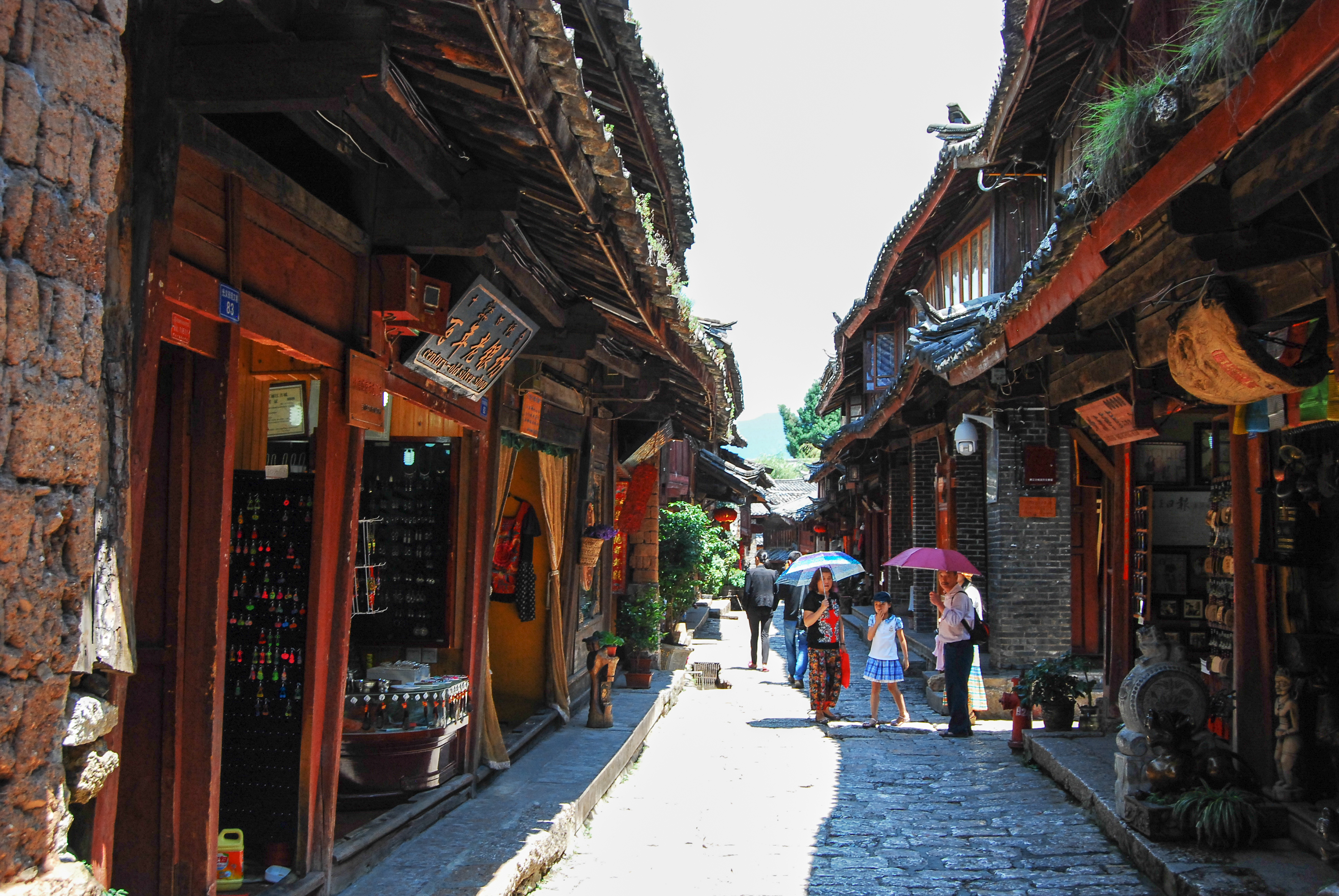 中文（中国大陆）: 丽江古城街景